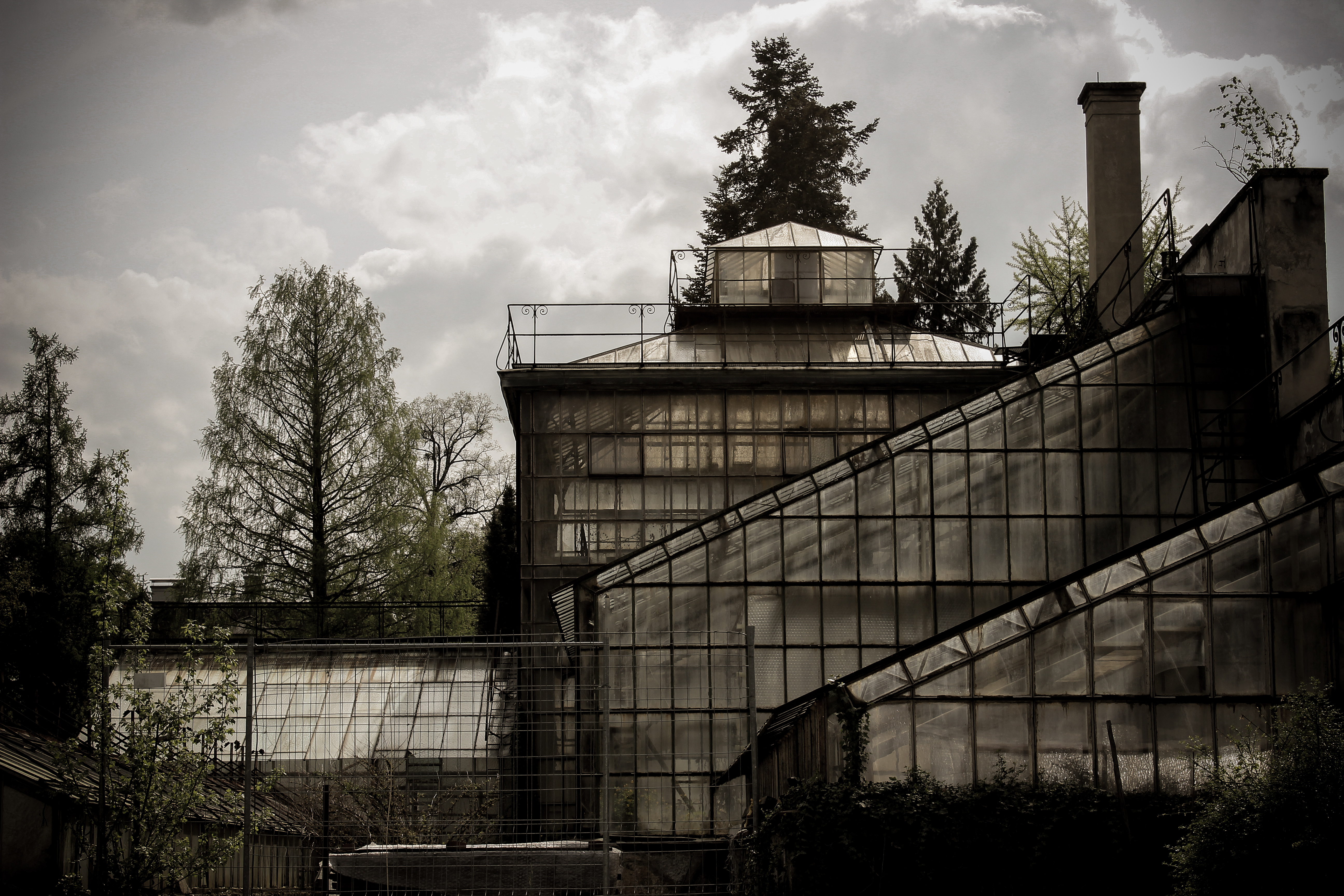 Glashaus, Gewächshausanlage im Botanischen Garten der Karl-Franzens-Universität